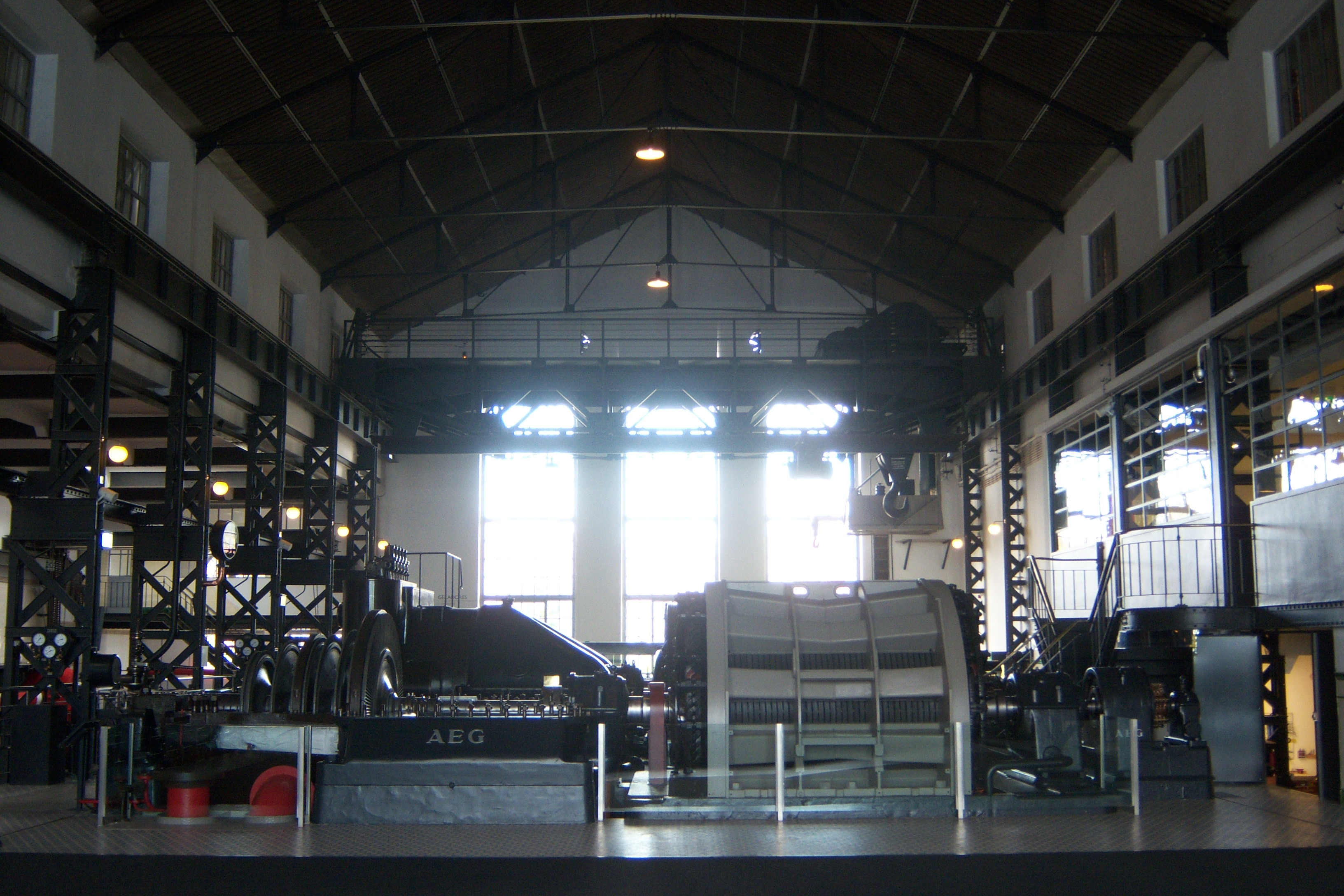 Turboalternador musealitzat al Museu de l'Electricitat